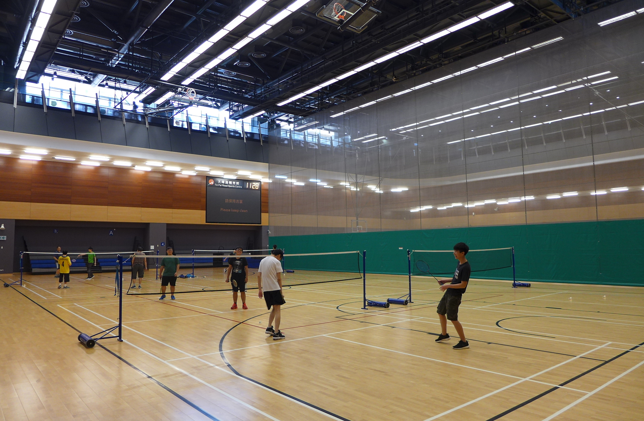 Tin Fai Road Sports Centre Multi Purpose Arena